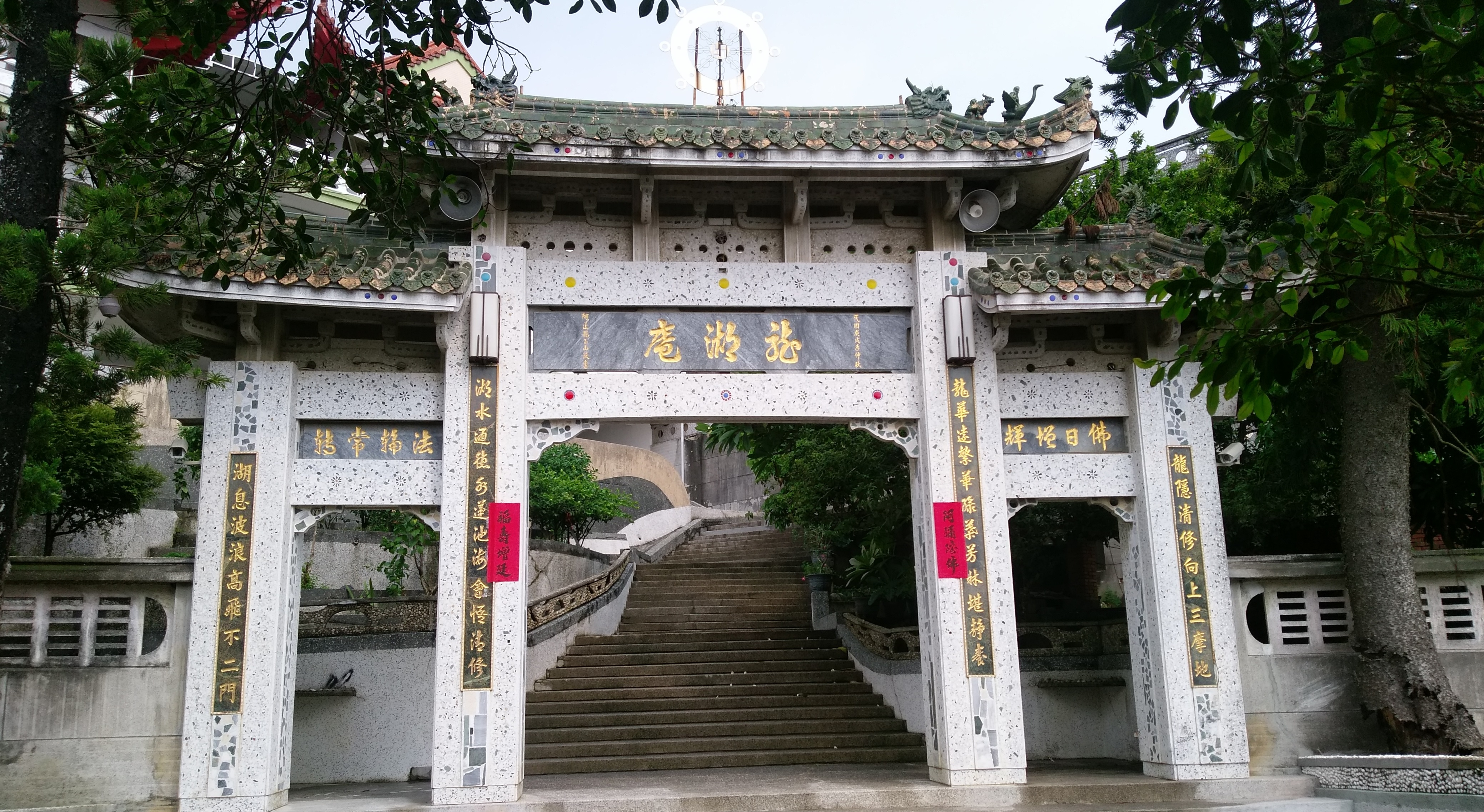 中文（台灣）: 龍湖庵山門牌坊